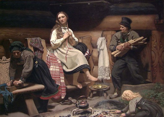 Norwegian: Setesdalsinteriør.Old Farm Interior from Setesdaltitle QS:P1476,no:"Setesdalsinteriør." label QS:Lno,"Setesdalsinteriør."